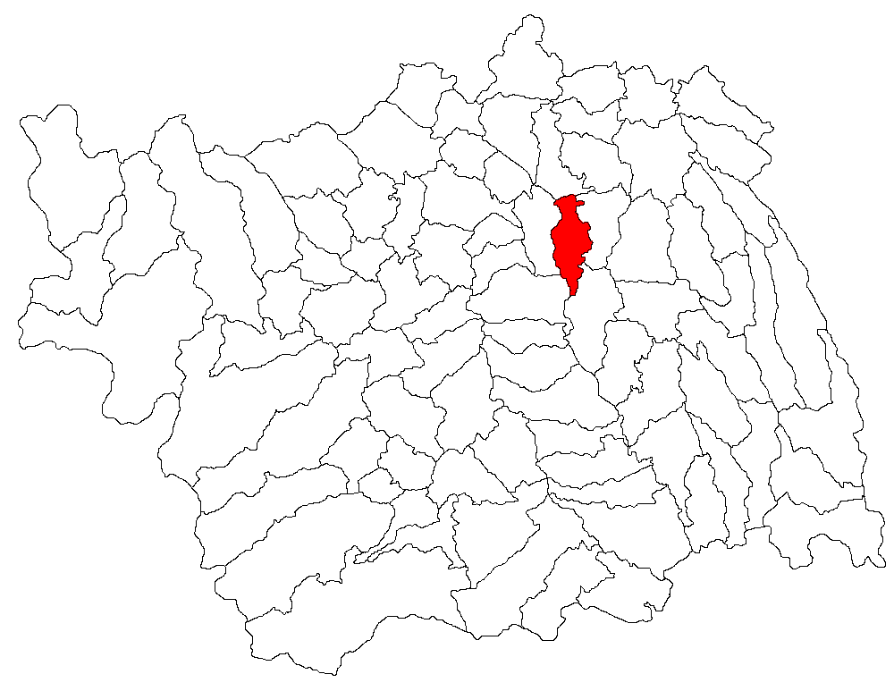 Categorie:Hărţi ale judeţului Bacău